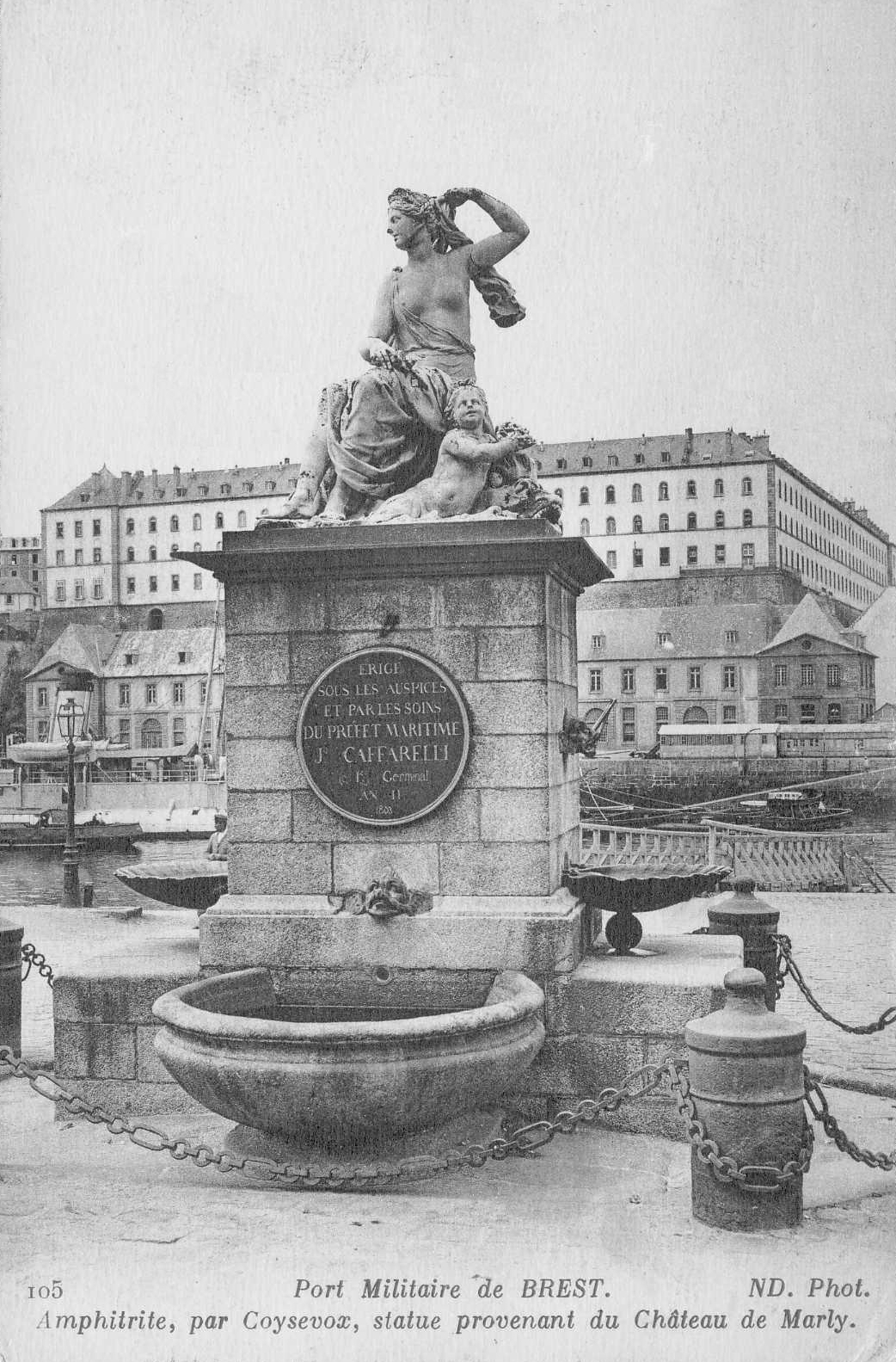 La Fontaine Caffarelli à Brest avant 1910 (d'après le logo de la carte postale)